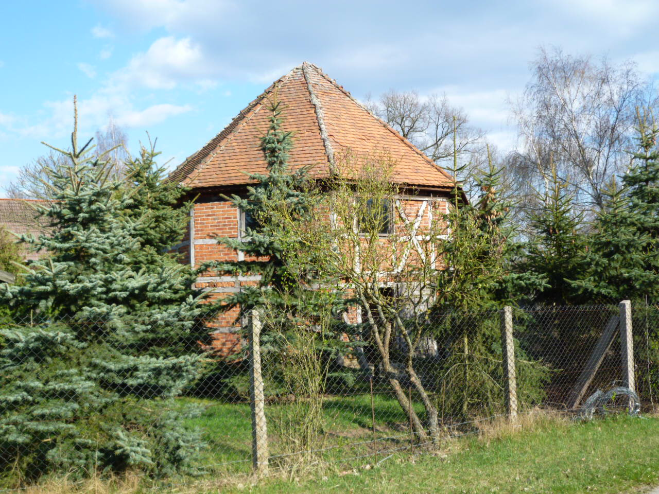 Calvörde-Dorst, Taubenturm am Gutshaus 2012